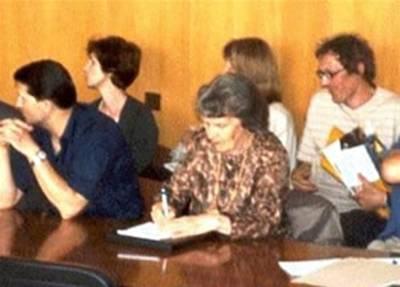 Доктор философских наук, профессор